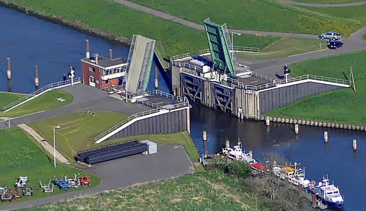 Luftbilder von der Nordseeküste 2012-05